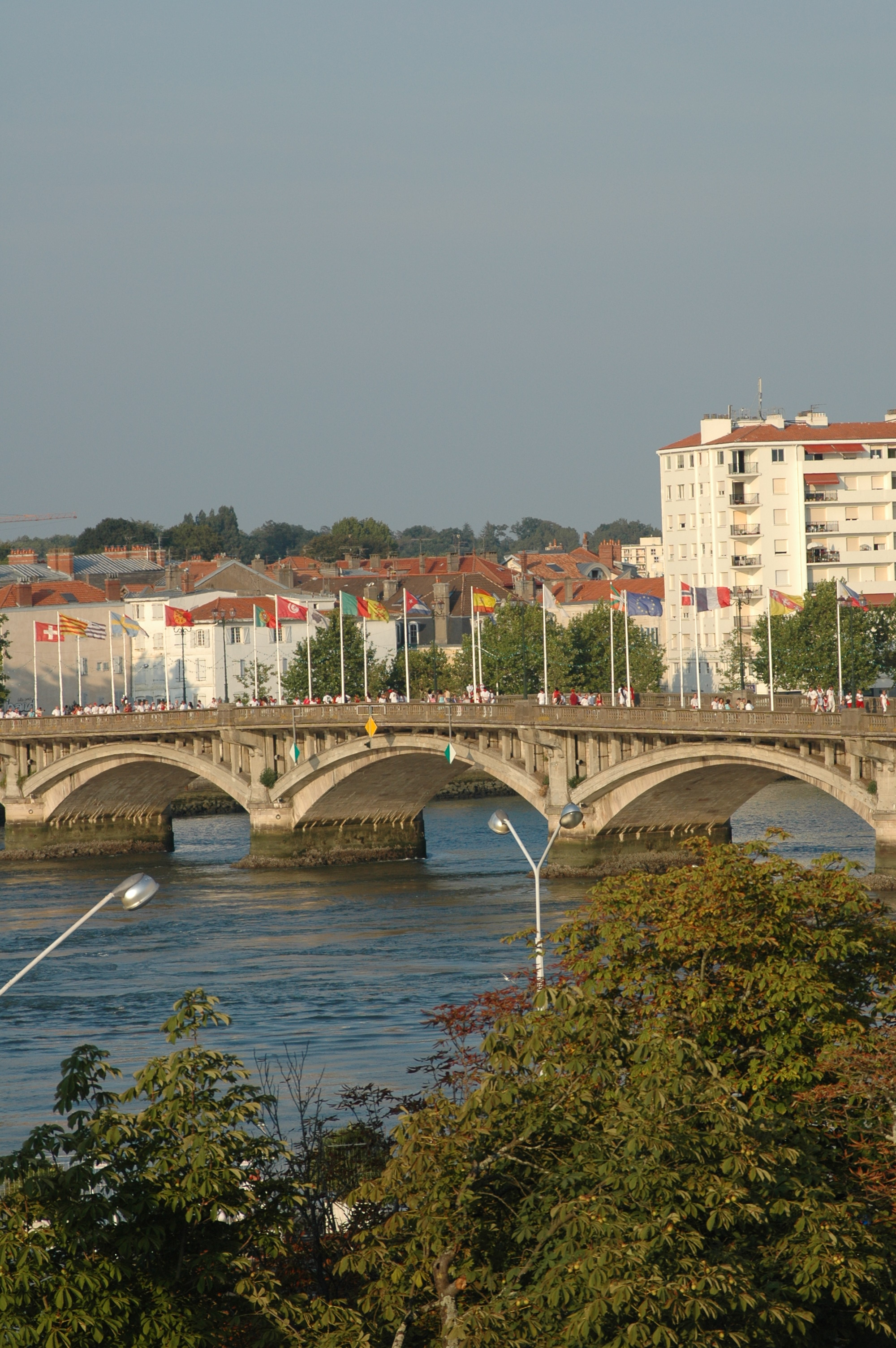 Bayonne, pont sur l'Adour. Photo prise le 03/08/06 par Harrieta171